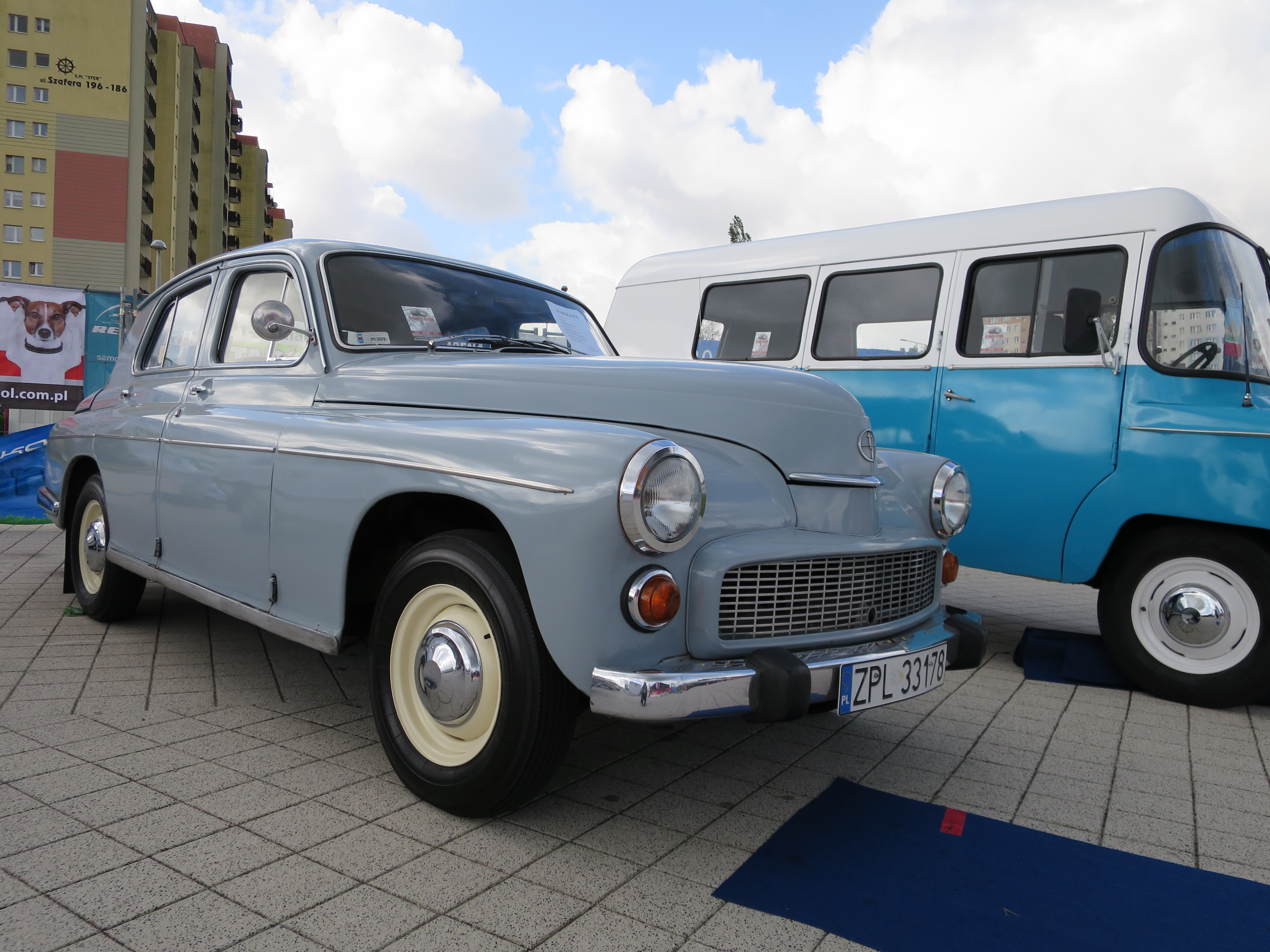 FSO Warszawa 223 MotoShow Szczecin 2015